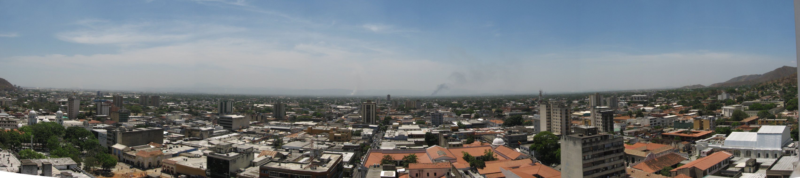 Vista del sur de la ciudad de Valencia (Venezuela) captada desde la Torre Castillito ubicada en el centro de la ciudad